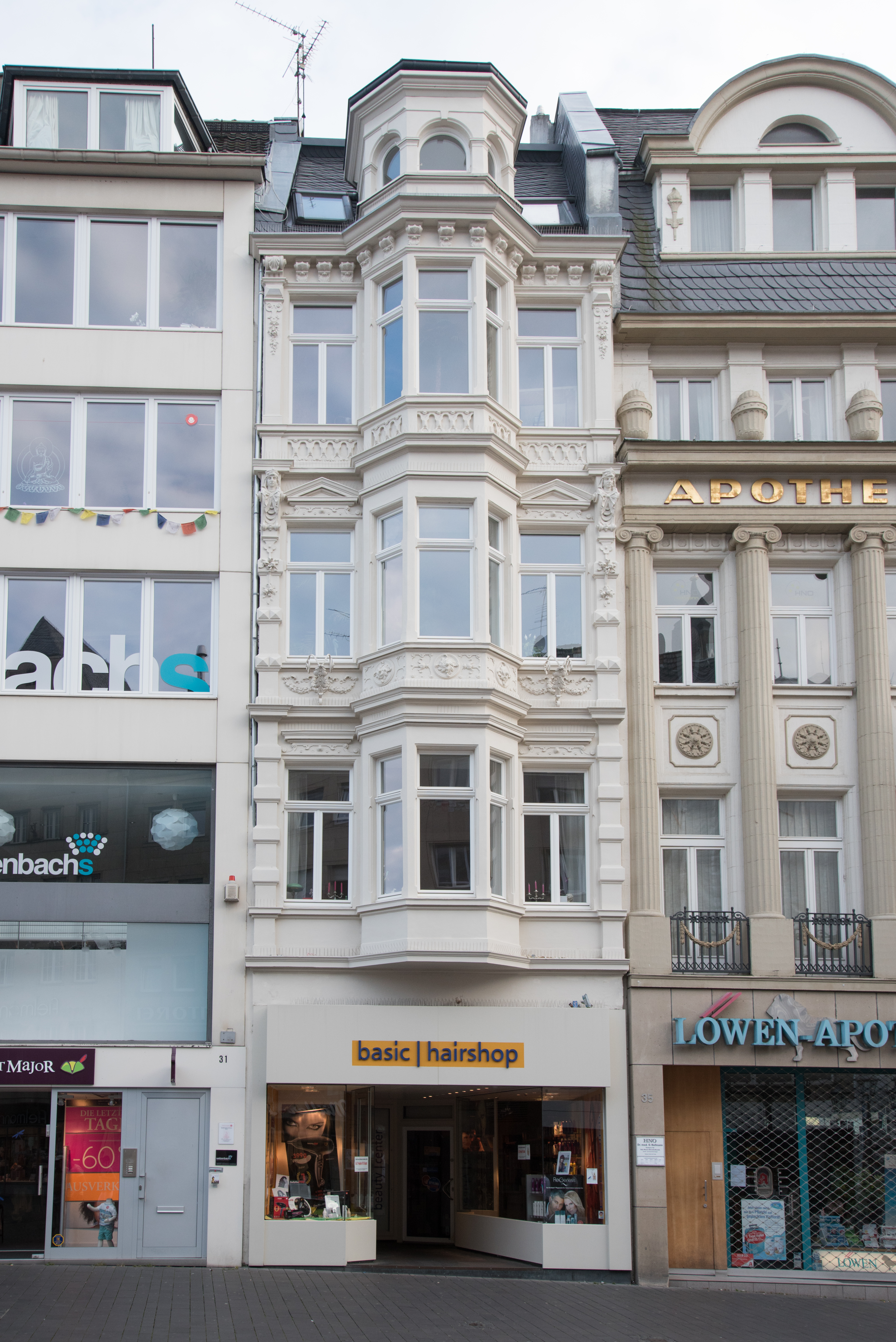 Denkmalgeschütztes Wohn- und Geschäftshaus, Markt 33, Bonn-Zentrum